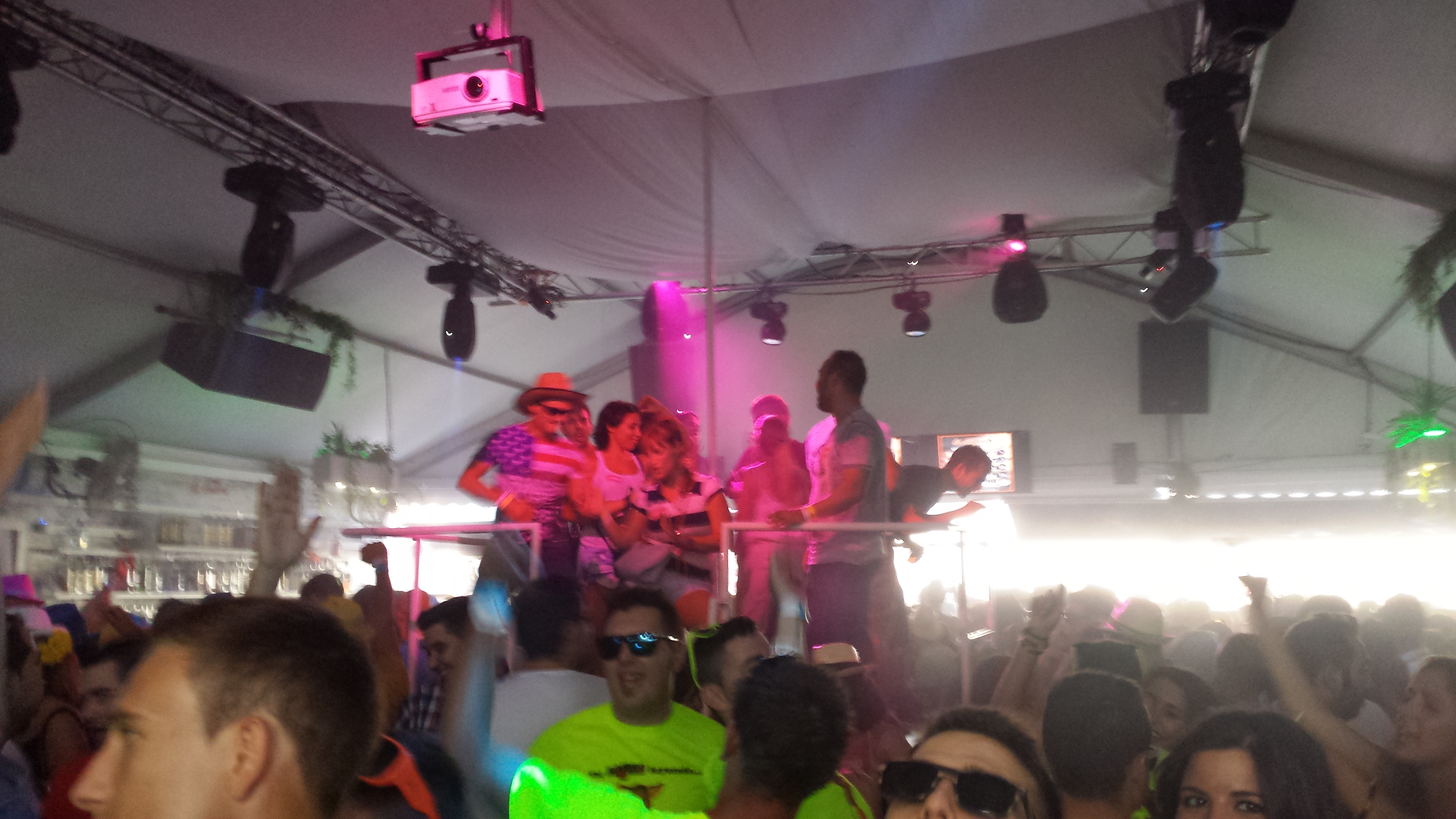 Vista interior de una carpa de discoteca de la Feria de Albacete. Ejidos de la Feria